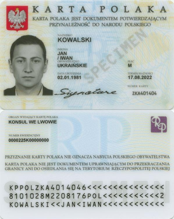 Wzór Karty Polaka (awers i rewers), który określa rozporządzenie Rady Ministrów z dnia 4 marca 2008 r. w sprawie określenia wzoru wniosku o przyznanie Karty Polaka oraz wzoru Karty Polaka (Dz.U. 2008 Nr 48 poz. 282).